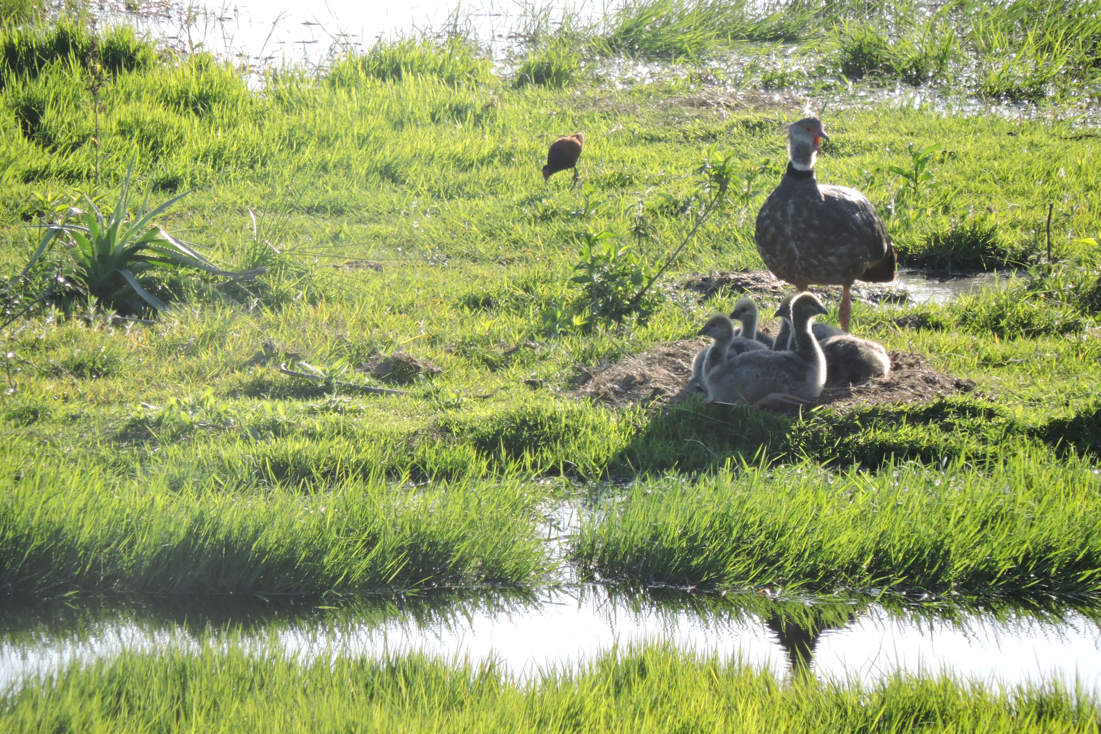 Tachã. Interior de Candiota-RS. Bioma Pampa.